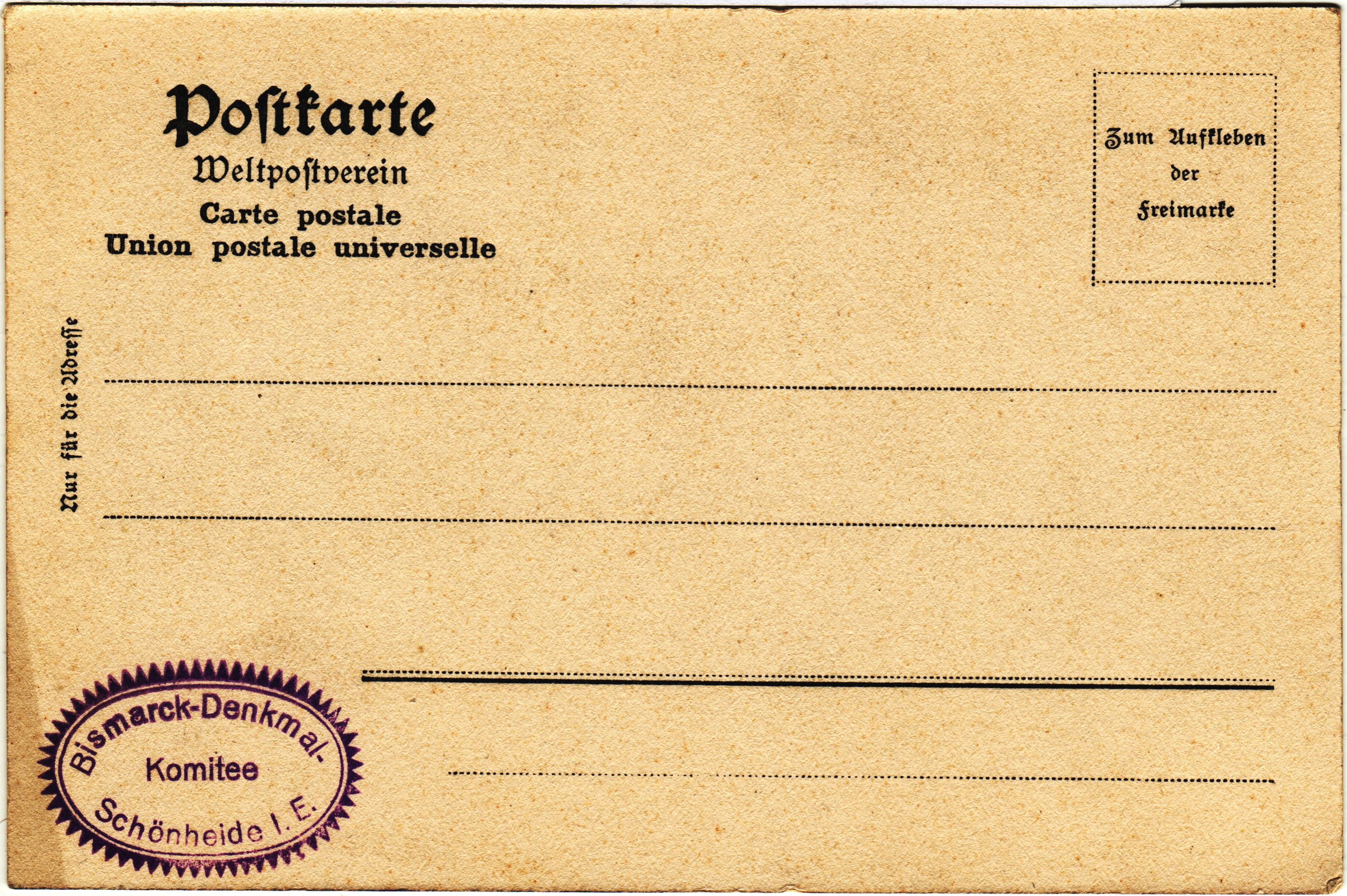 Fuchswinkel, ein Ortsteil von Schönheide im Erzgebirge: Seit um 1900 erstrebt ein Bismarck-Komitee Schönheide die Errichtung eines Bismarck-Denkmals auch in Schönheide. 1910 kaufte die Gemeinde Schönheide die Waldfläche um den Fuchsstein (721, 9 Meter), gestaltet sie parkartig und nennt sie Bismarckhain. Zum 100. Geburtstag Bismarcks am 1. April 1915, mitten im Ersten Weltkrieg, wird ein Bismarck-Relief enthüllt. Unmittelbar nach dem Zweiten Weltkrieg entfernt die Gemeinde Schönheide das Relief und gibt dem Fuchsstein seinen Namen zurück.